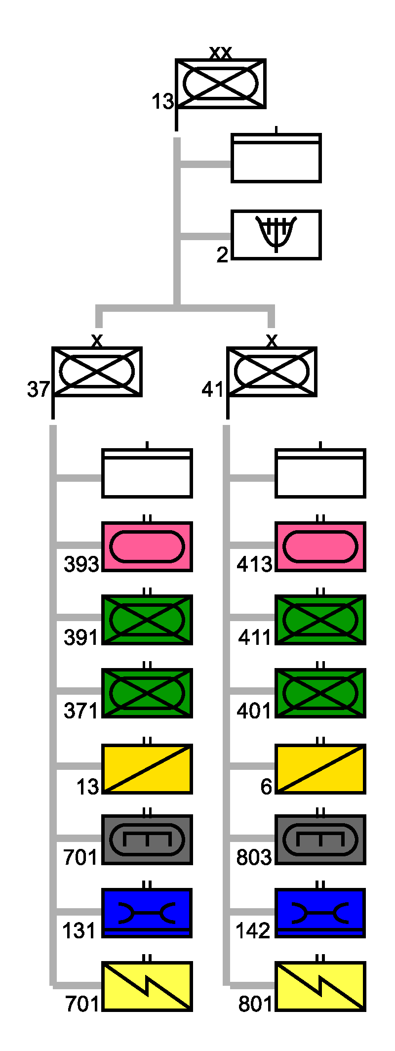 Gliederung 13. Panzergrenadierdivision im deutschen Heeres.